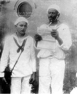 Ao lado de um dos Marinheiros, João Cândido lê o manifesto da Revolta: fim dos castigos corporais.